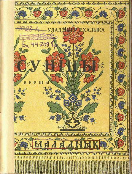 Беларуская (тарашкевіца): Вокладка першага зборніка вершаў «Суніцы» (1926) беларускага паэта Ўладзімера Хадыкі